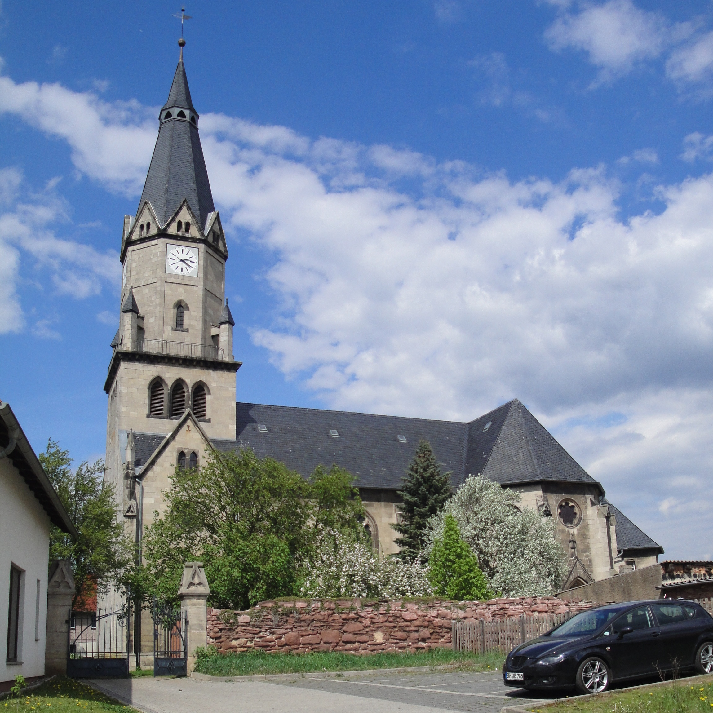 Evangelische St. Petri-Pauli-Kirche, 06536 Berga